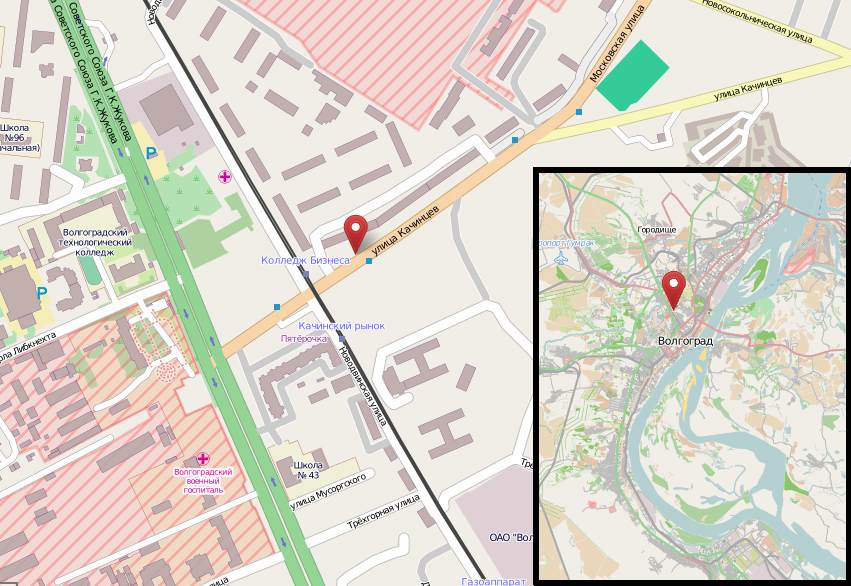 Attentats de décembre 2013 à Volgograd, attentat-suicide dans un des trolleybus.